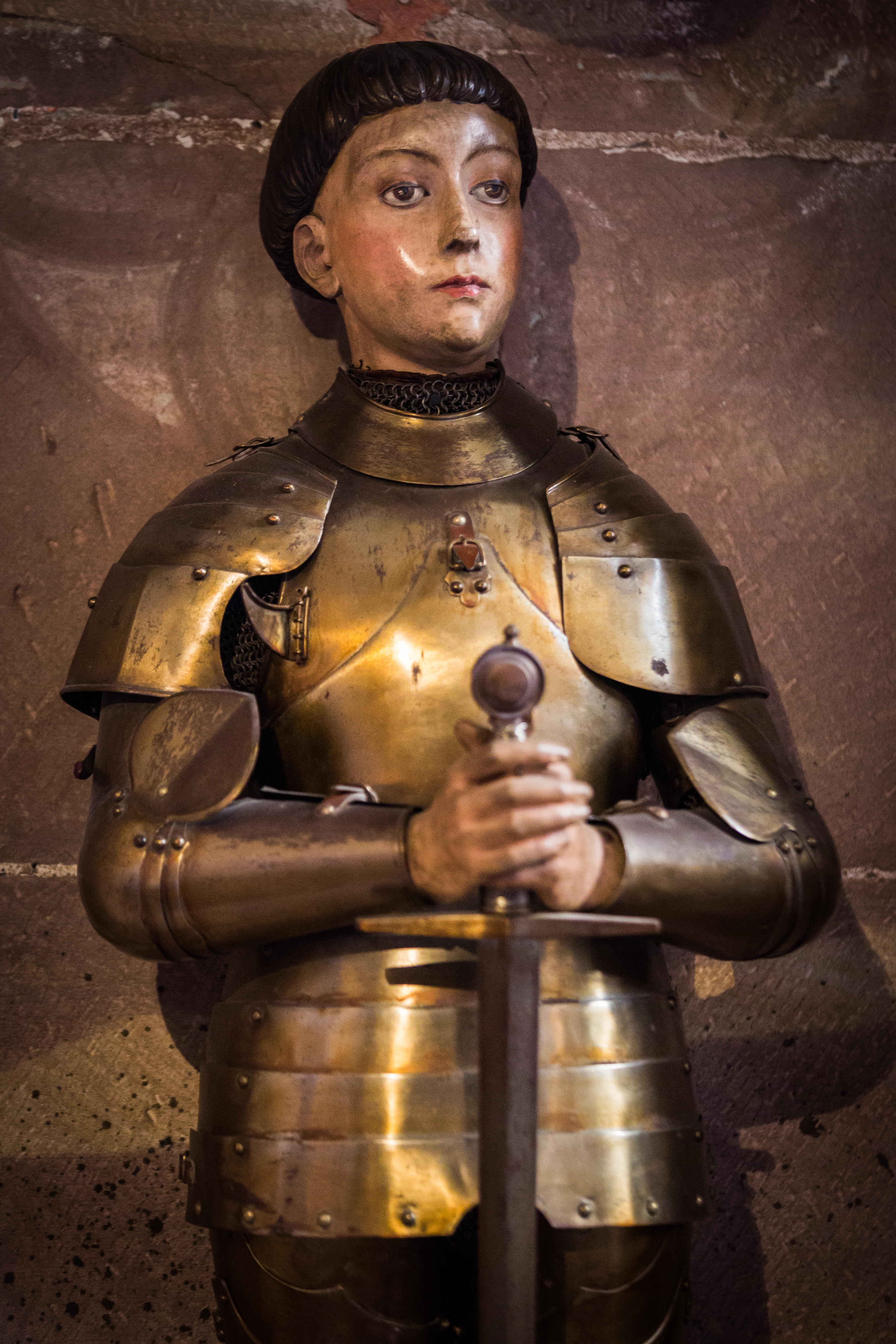 Cathédrale Notre-Dame de Strasbourg chapelle Ste Catherine statue de Jeanne d’Arc. Sculptée sur bois dans un atelier de Ribeauvillé, dotée d’une armure et d’une épée métalliques acquises à Paris, cette statue a été installée en 1937 dans la Cathédrale sur la suggestion de l’Union alsacienne Jeanne d’Arc, alors très active.